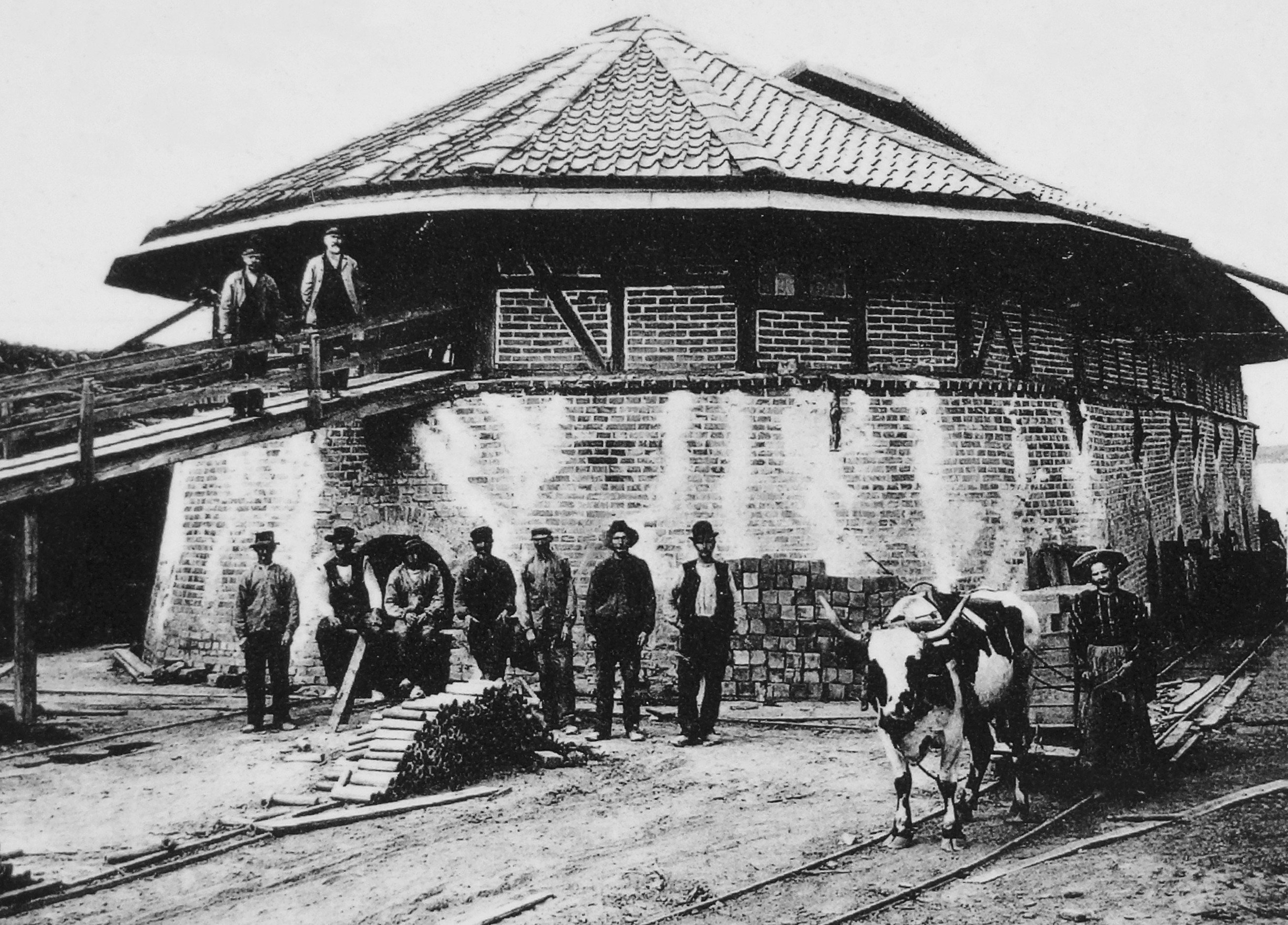 Ringugnen vid Slagsta tegelbruk